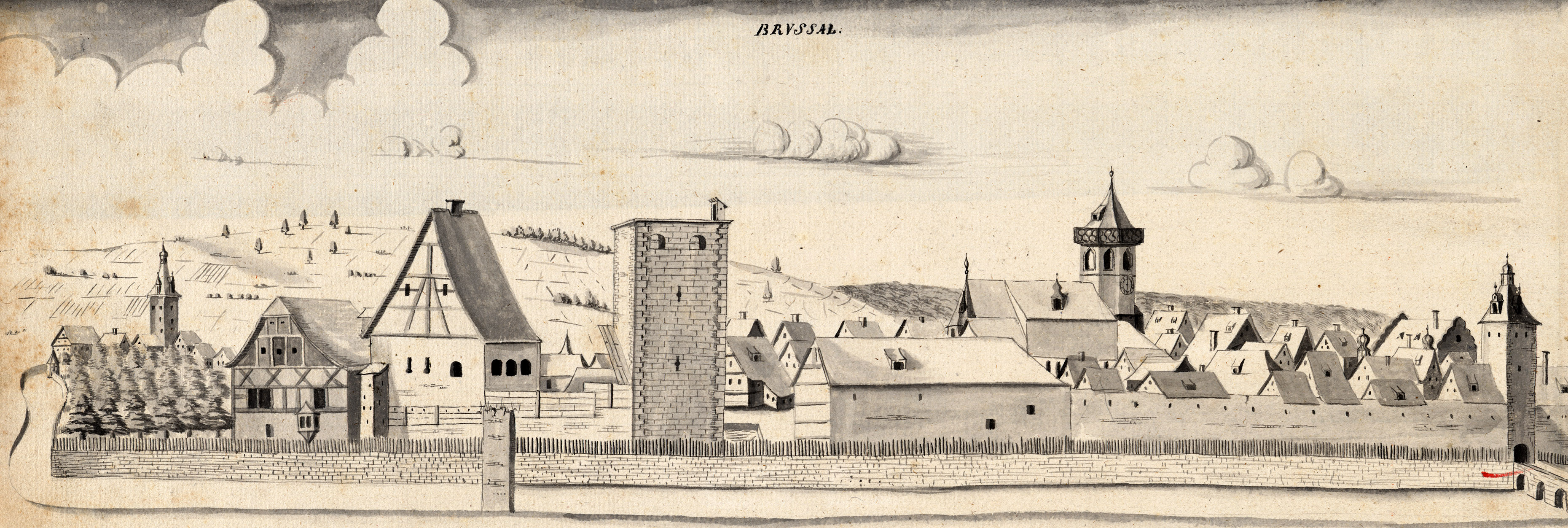 Ansicht der Stadt Bruchsal von Samson Schmalkalder, vor der Zerstörung 1689 (GLAK Hfk Planbände 19 Nr. 4).